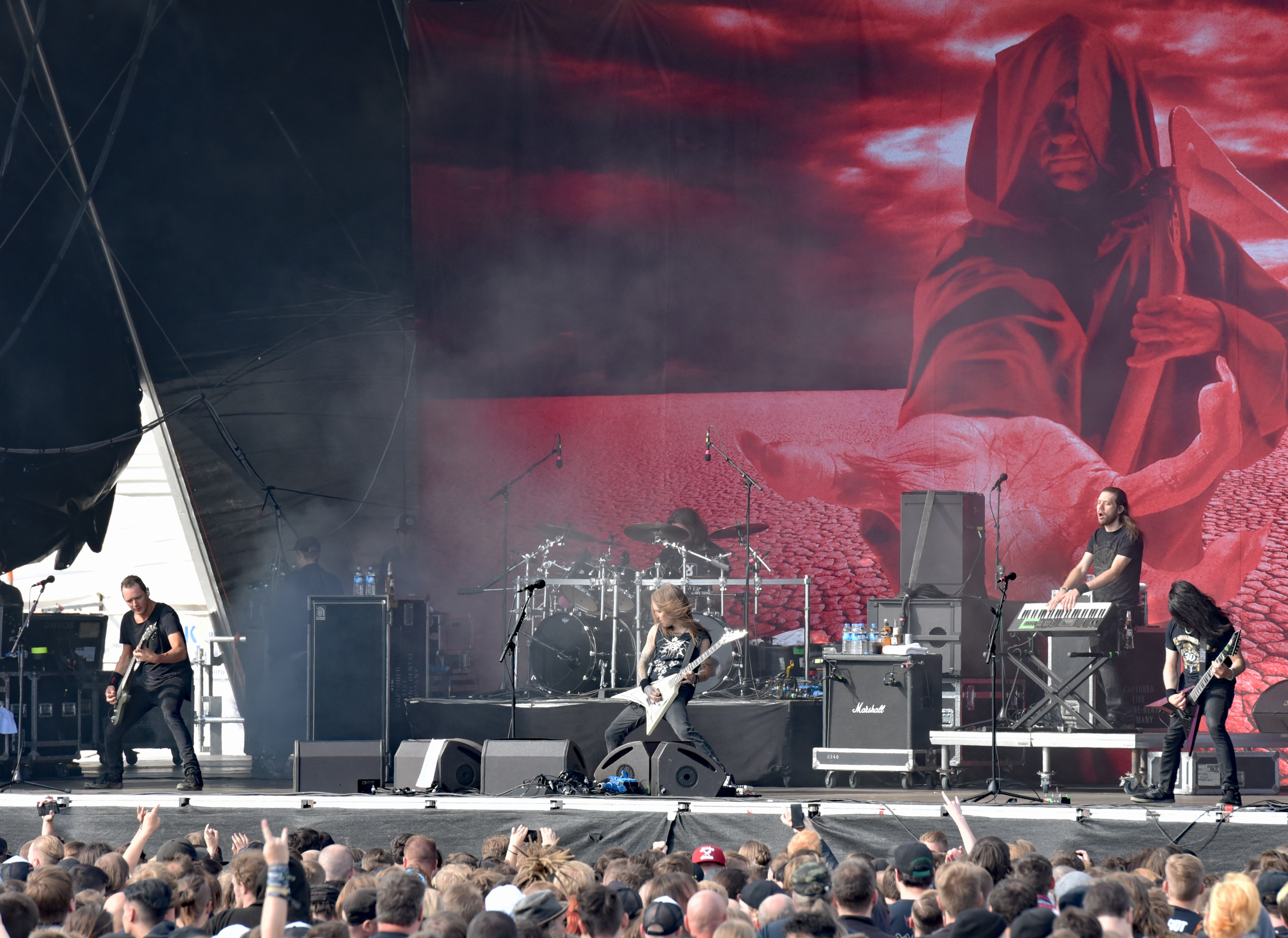 Children of Bodom beim Elbriot 2017